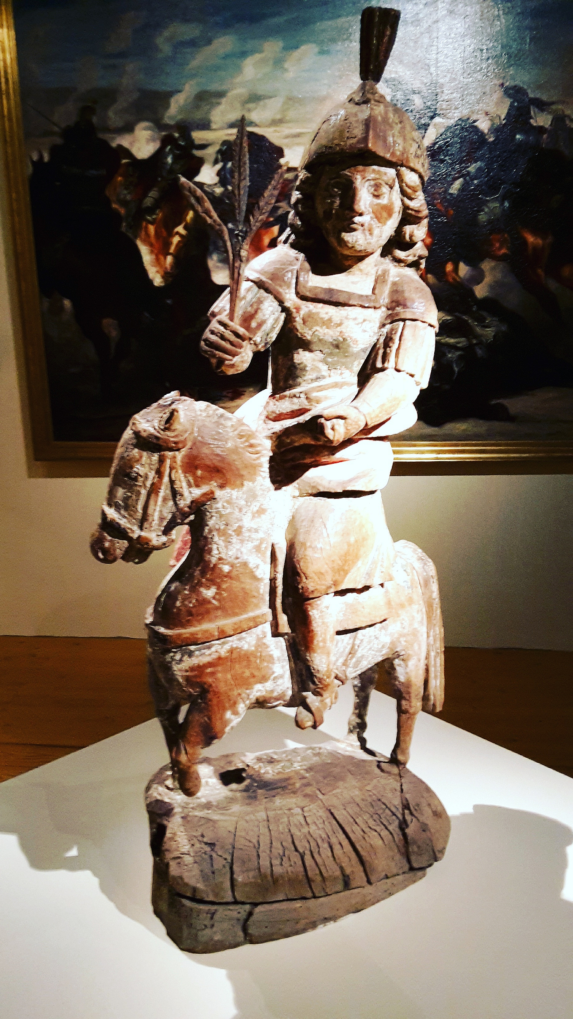 Statue équestre en bois polychrome de Saint-Rambert datée du 17ème siècle, collection du Musée des Civilisations de Saint-Just-Saint-Rambert